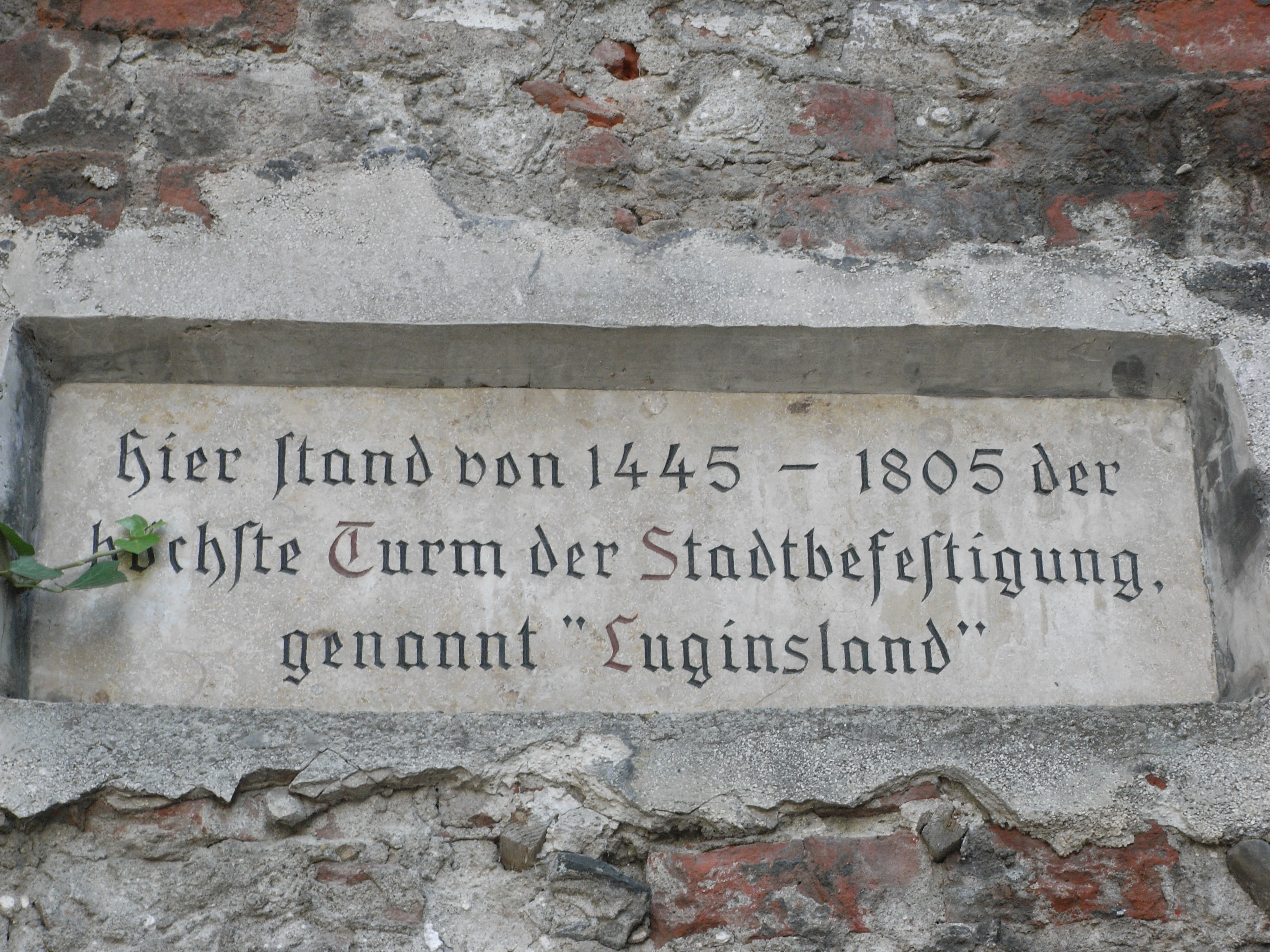 Geschichtstafel am Rest des Luginslandturms